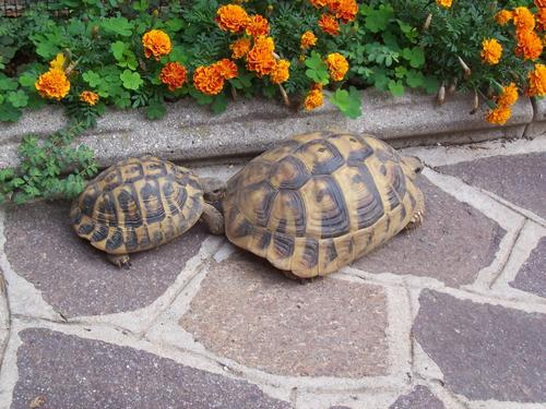 Testudo hermanni corteggiamento Brescia Italy